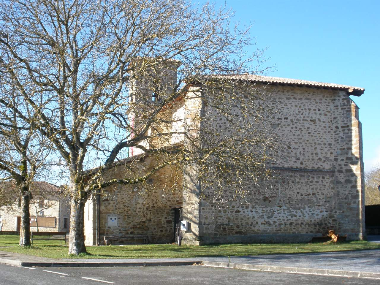 Iglesia de San Lorenzo, en Sarría (Zuia, Álava)